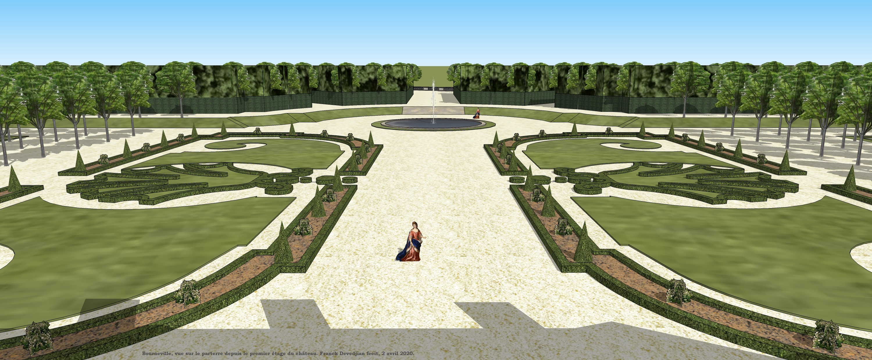 Restitution du château de Bourneville, XVIIIe siècle.